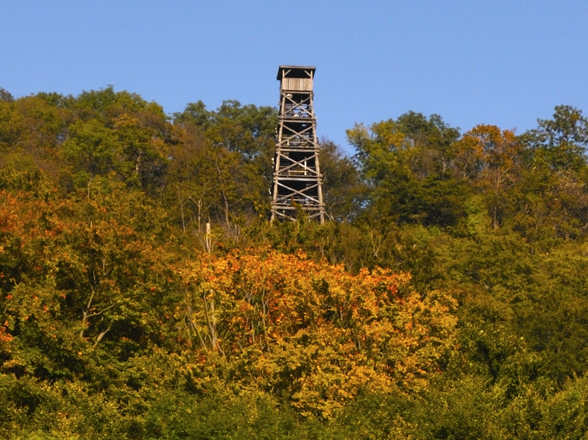 Plesseturm erbaut 1963/1964